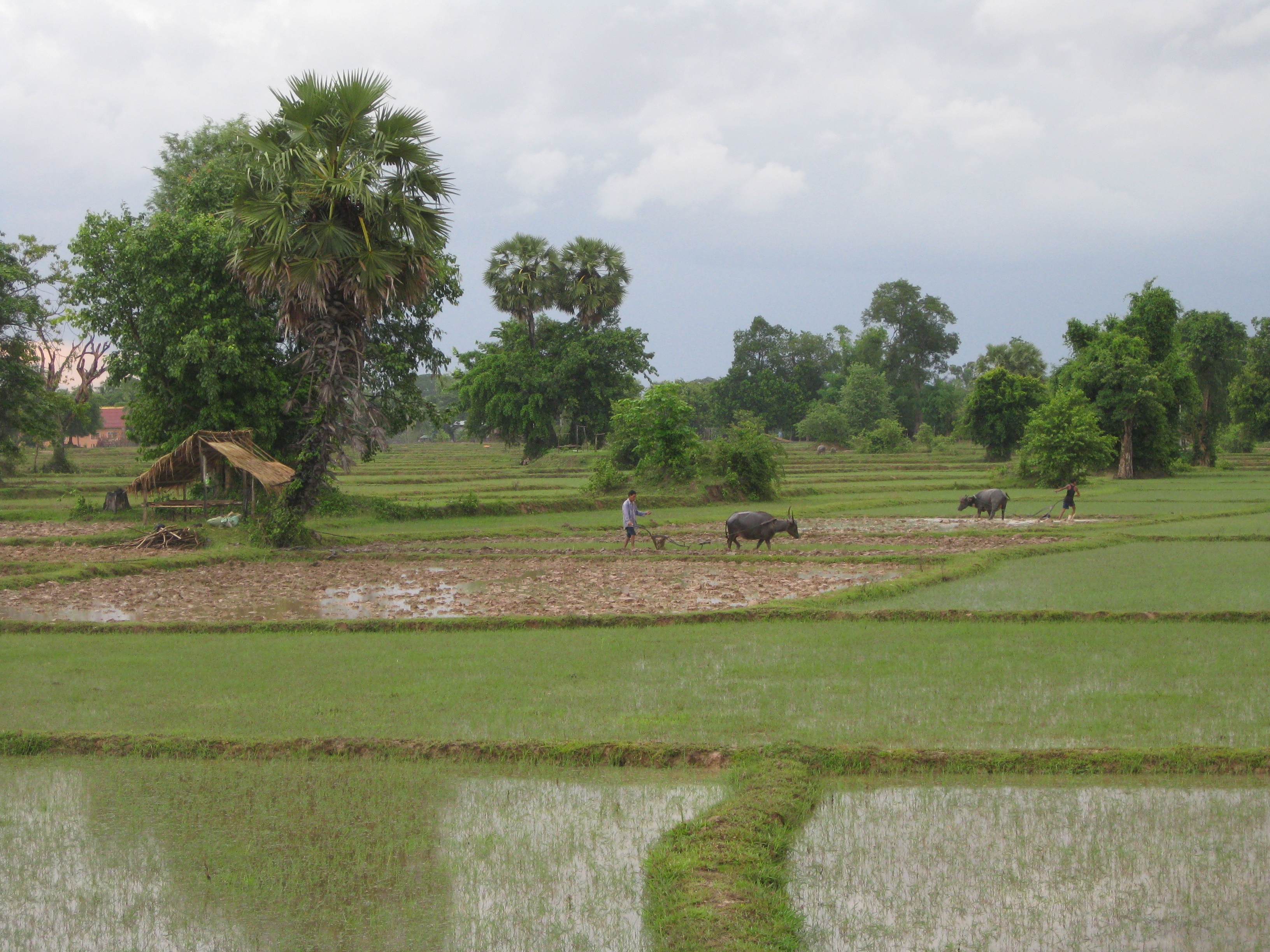 Ricefield on Don Det, Laos